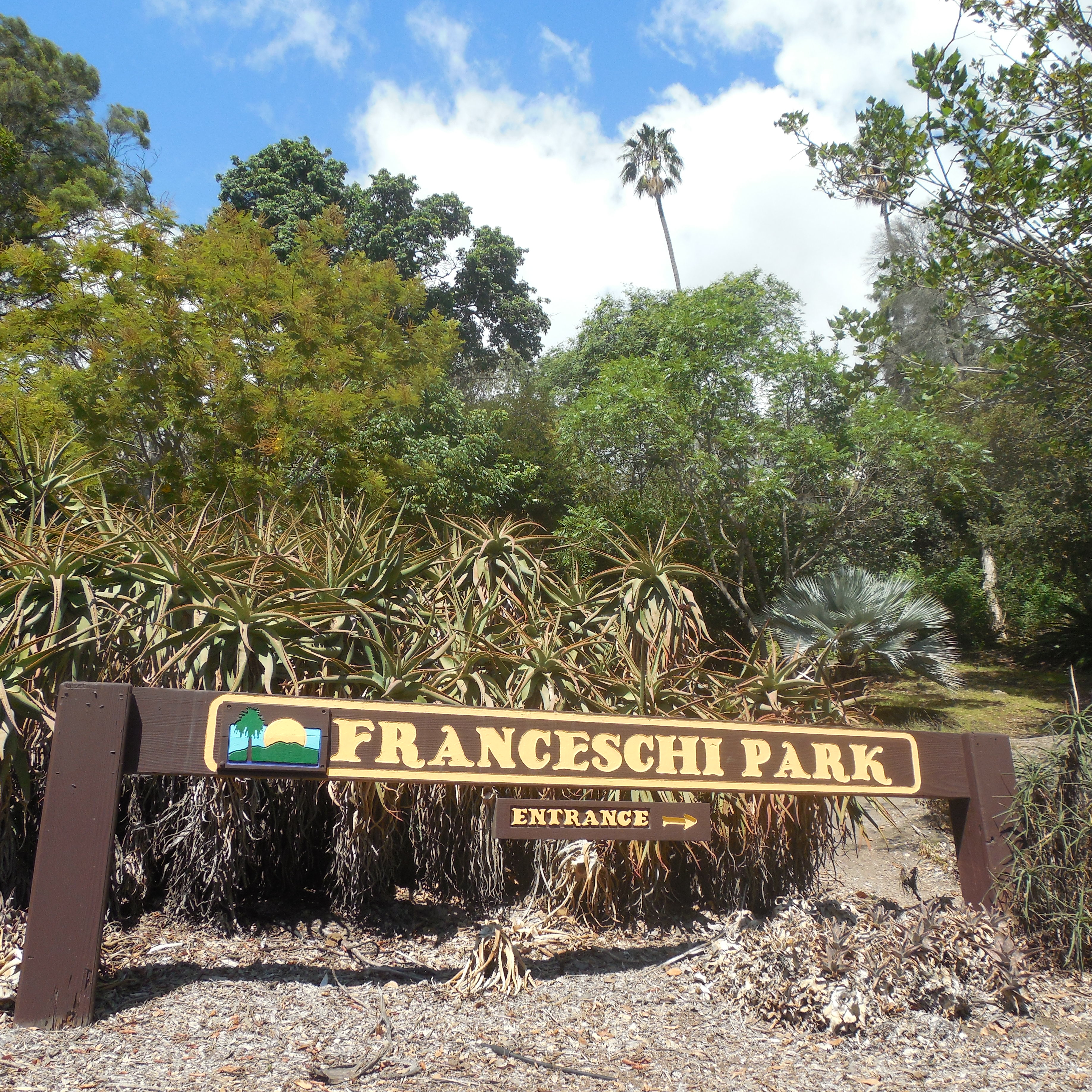 FranceschiPark_20160916